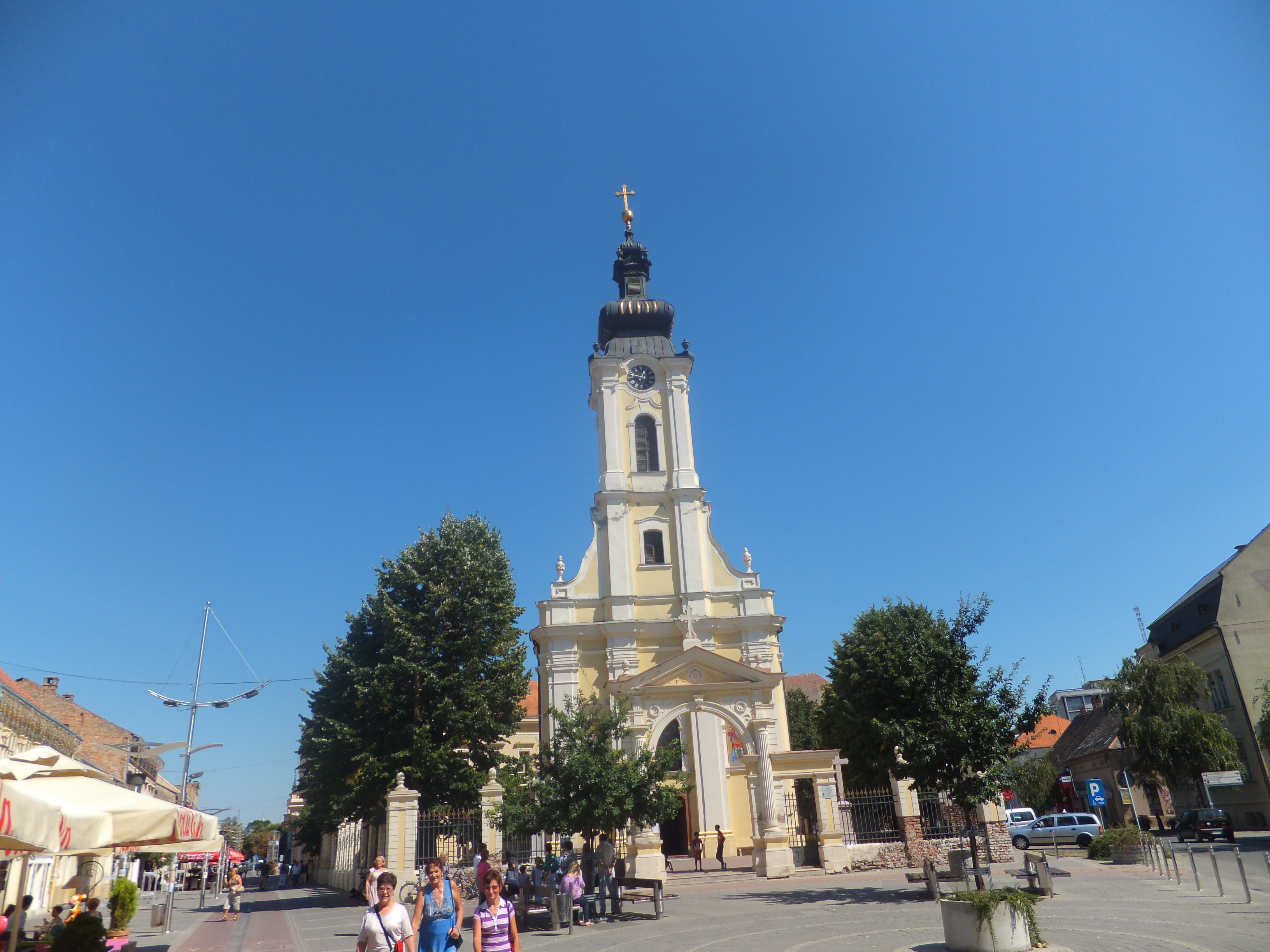 Црква Св. Димитрија у Сремској Митровици